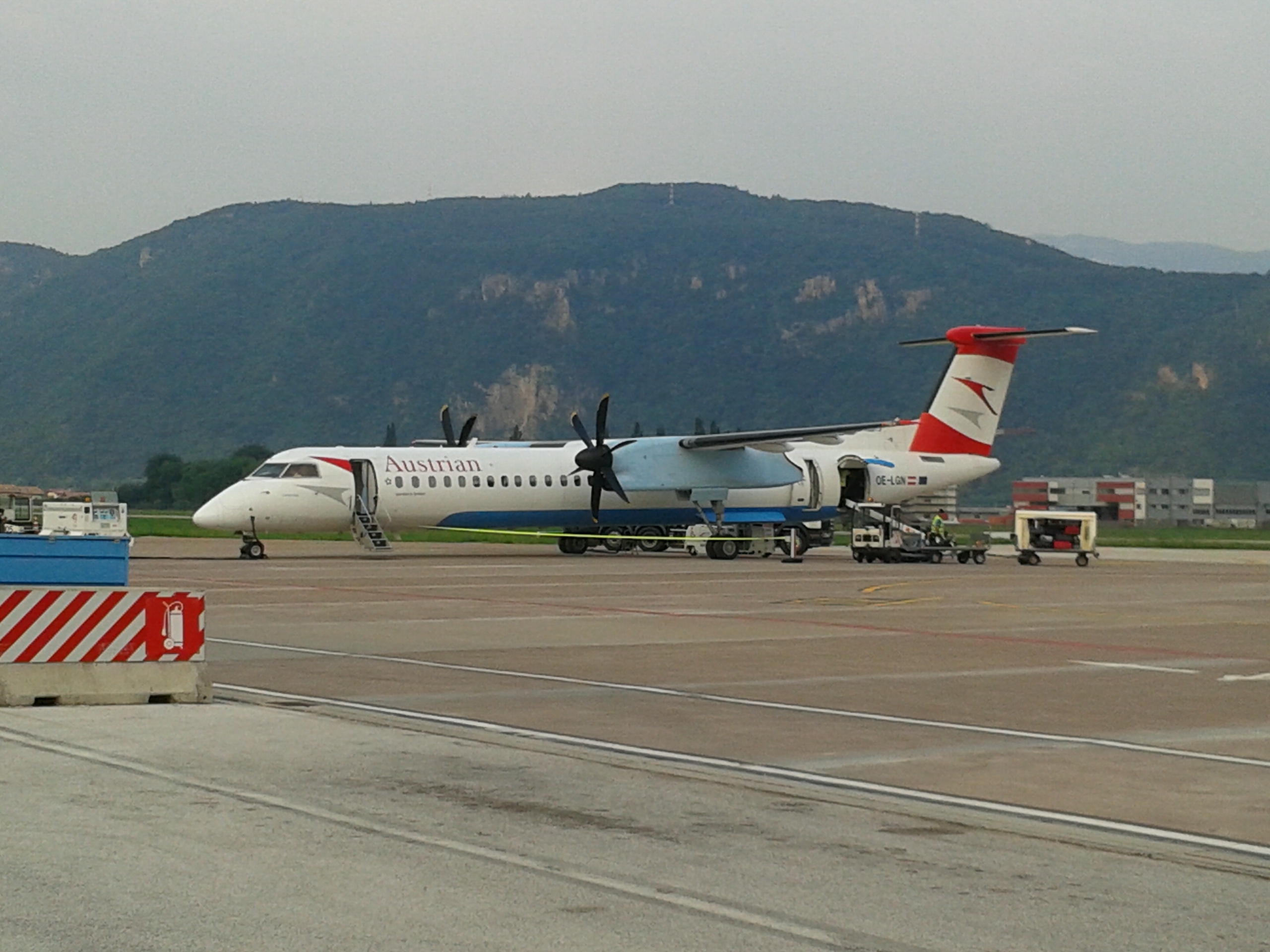 Austrian Arrows Bombardier Q400 presso Aeroporto Bolzano